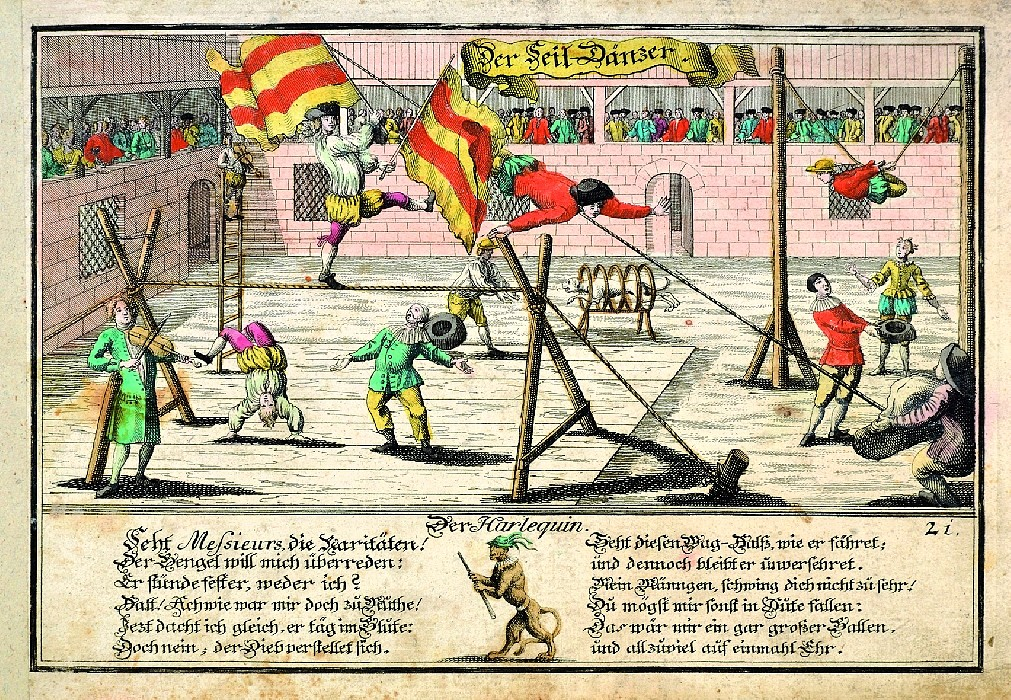 Der Seil-Däntzer (Seiltänzer); Tafel aus: Anganehme Bilder-Lust, der lieben Jugend zur Ergötzung also eingerichtet. Nürnberg, Monath, o. J. (ca. 1760)